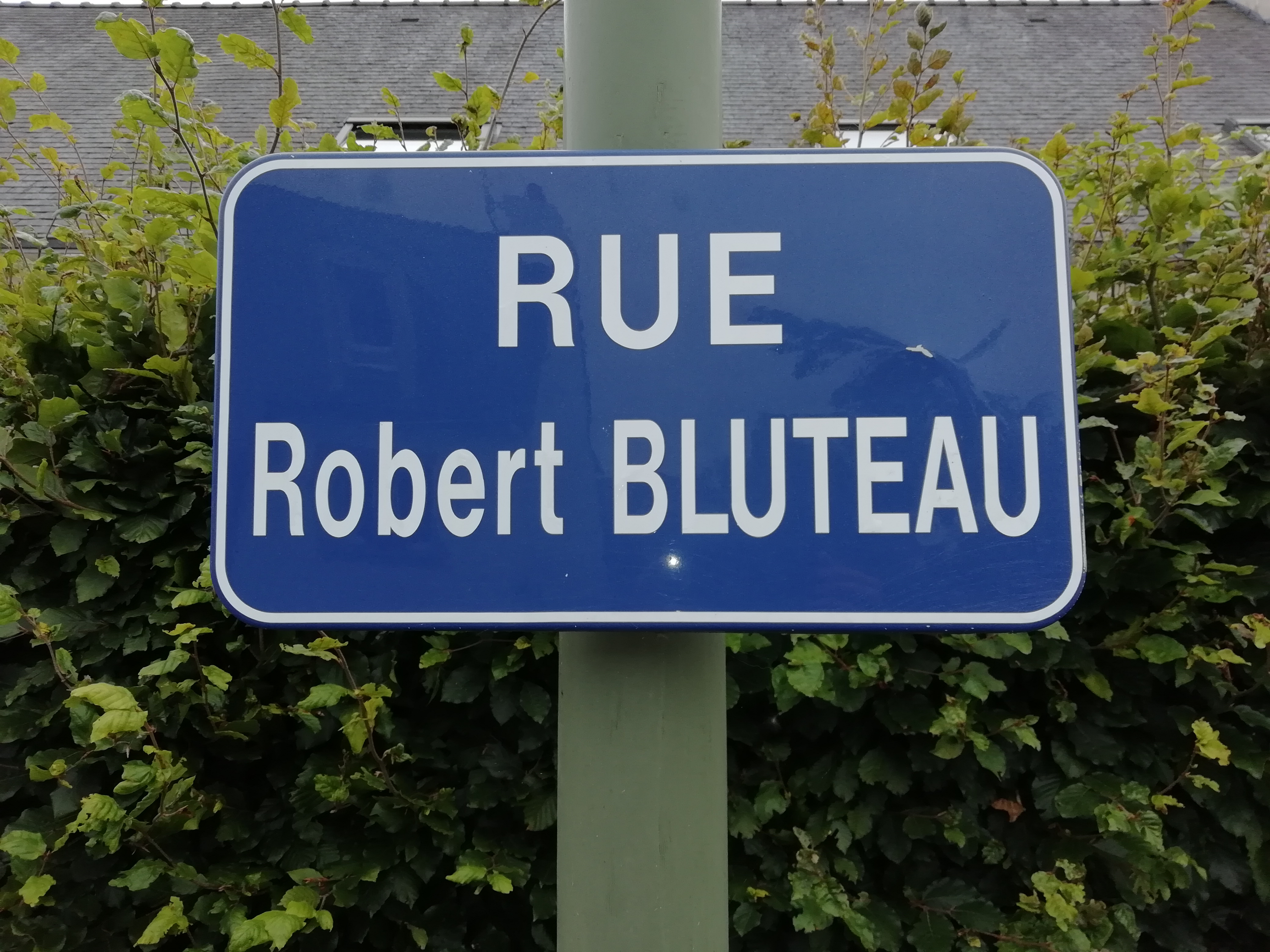 Peintre (1914-1985)